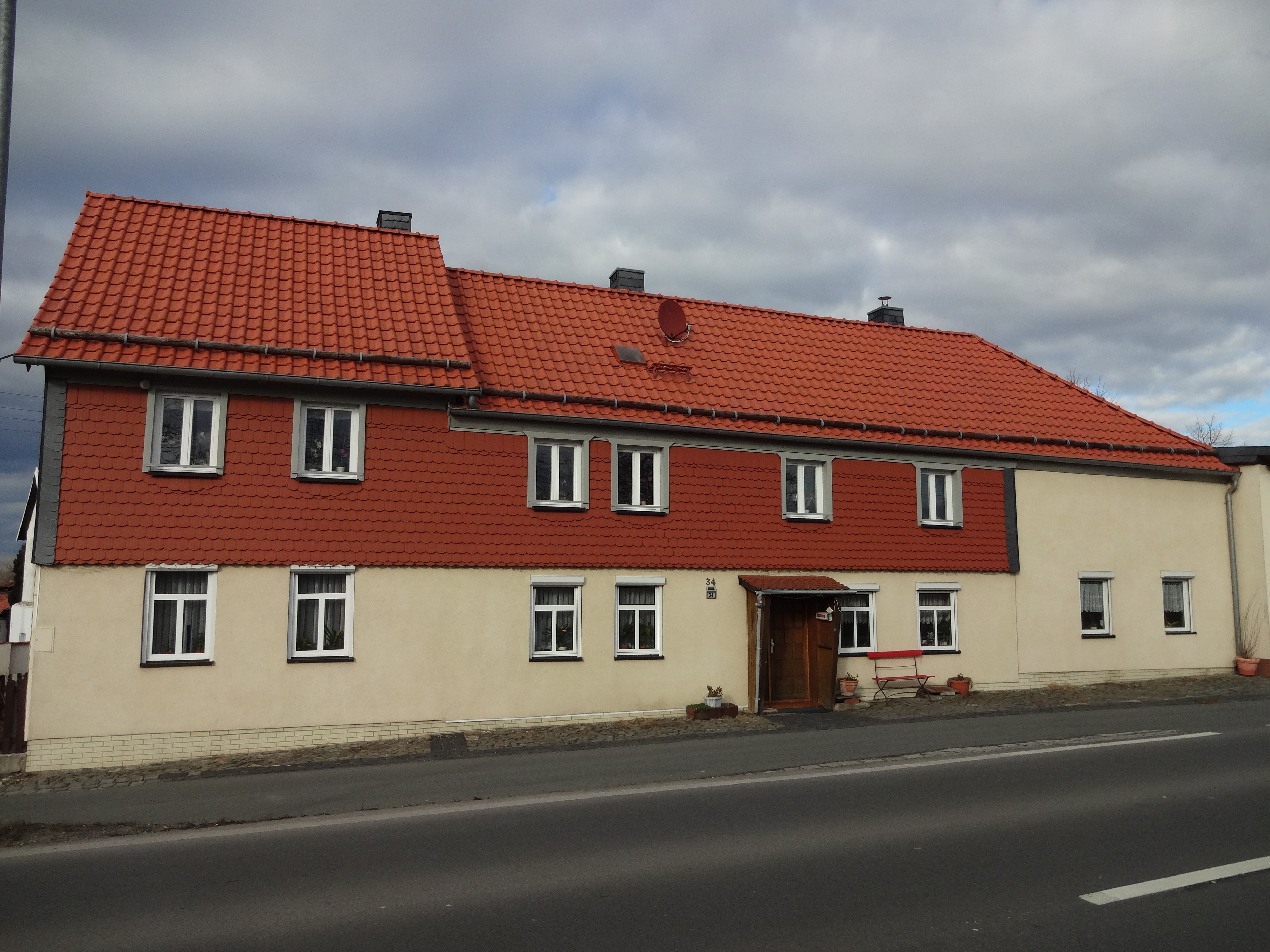 ehemaliges Kulturdenkmal Harzstraße 34 in Silstedt, Ortsteil von Wernigerode